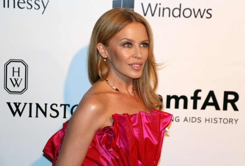 17 - Kylie Minogue-003